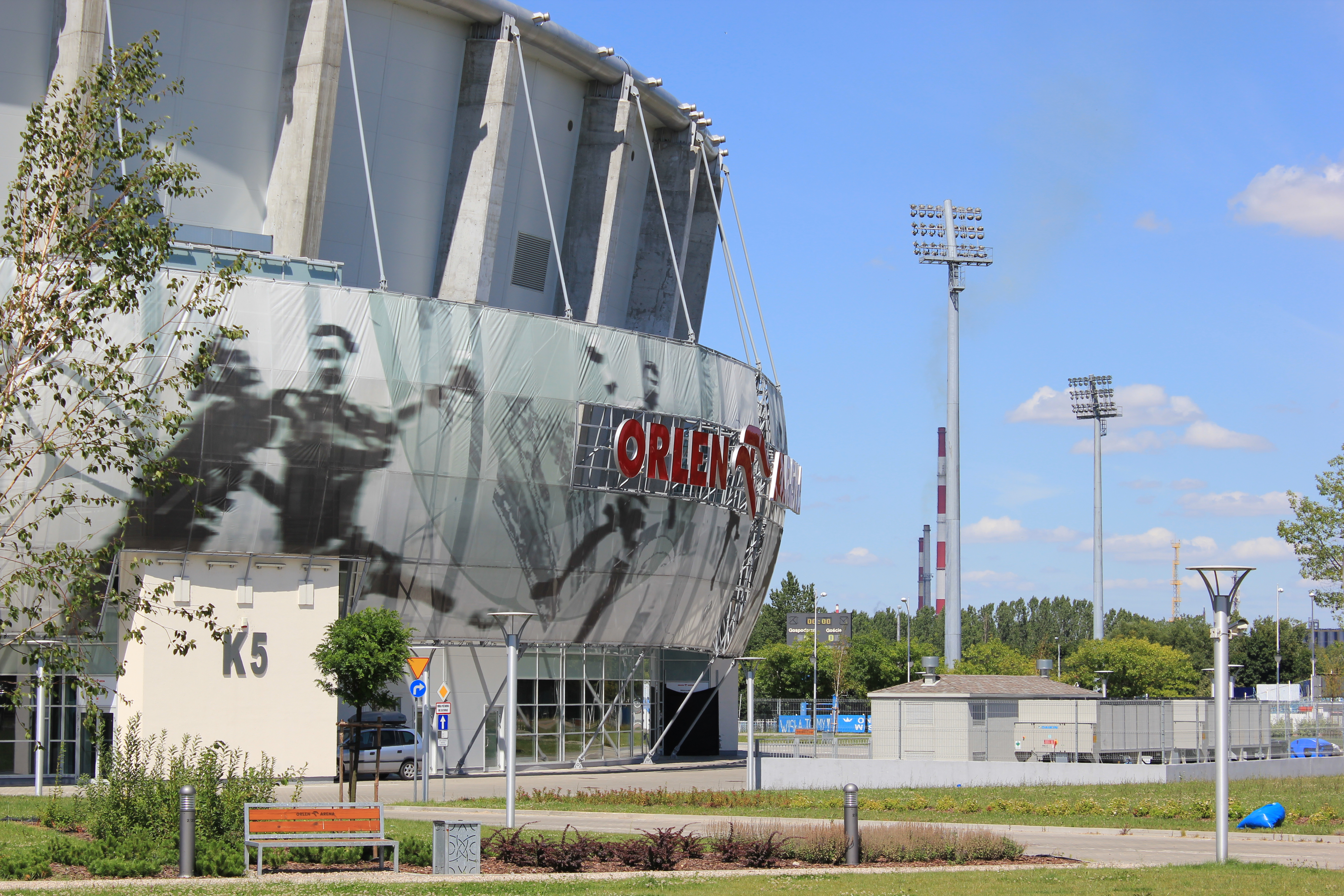 Stacja dwutransformatorowa zainstalowana przy Orlen Arena w Płocku.